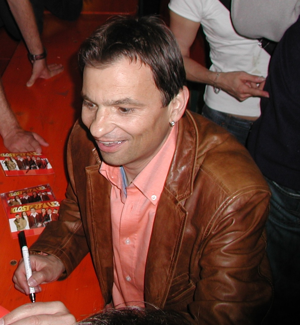 Markus Wolfahrt von den Klostertalern in Freiburg